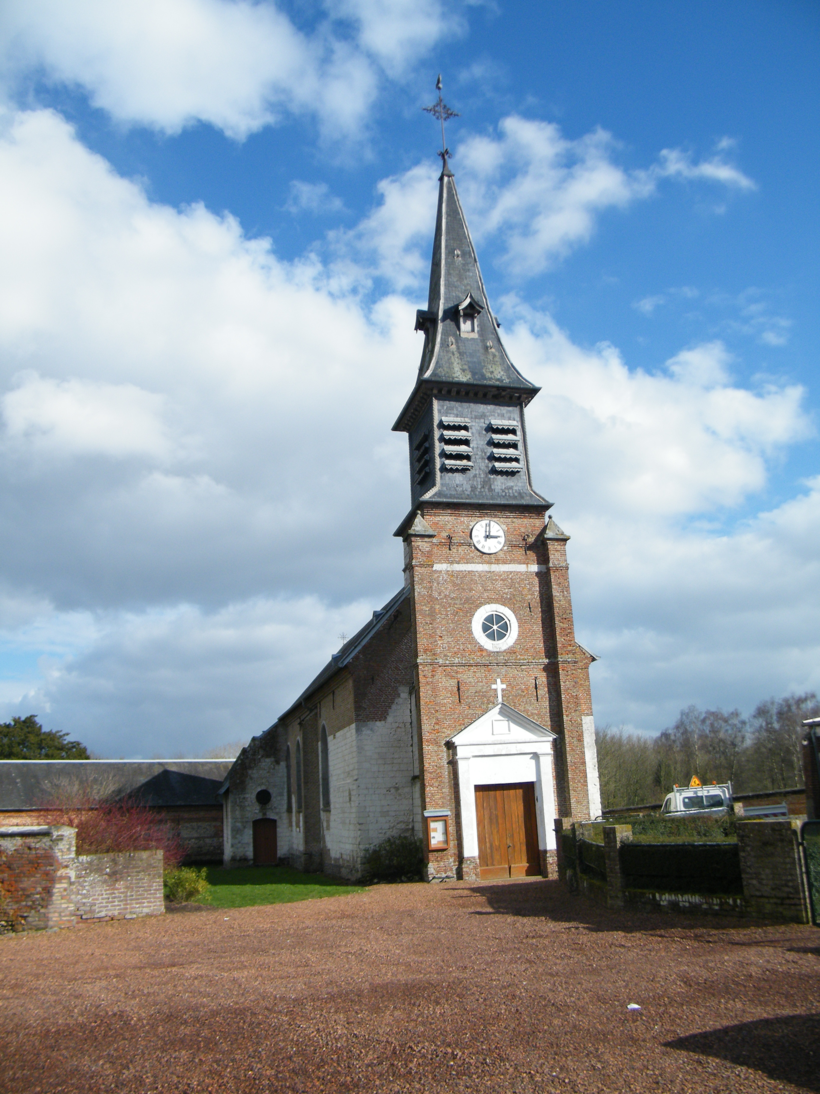 L'église Saint-Martin de Drucat, Somme, France.